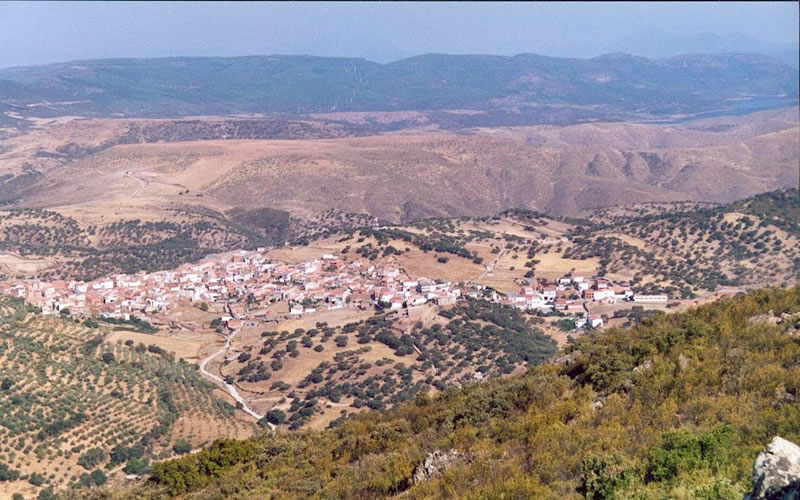 foto de villarta de los montes